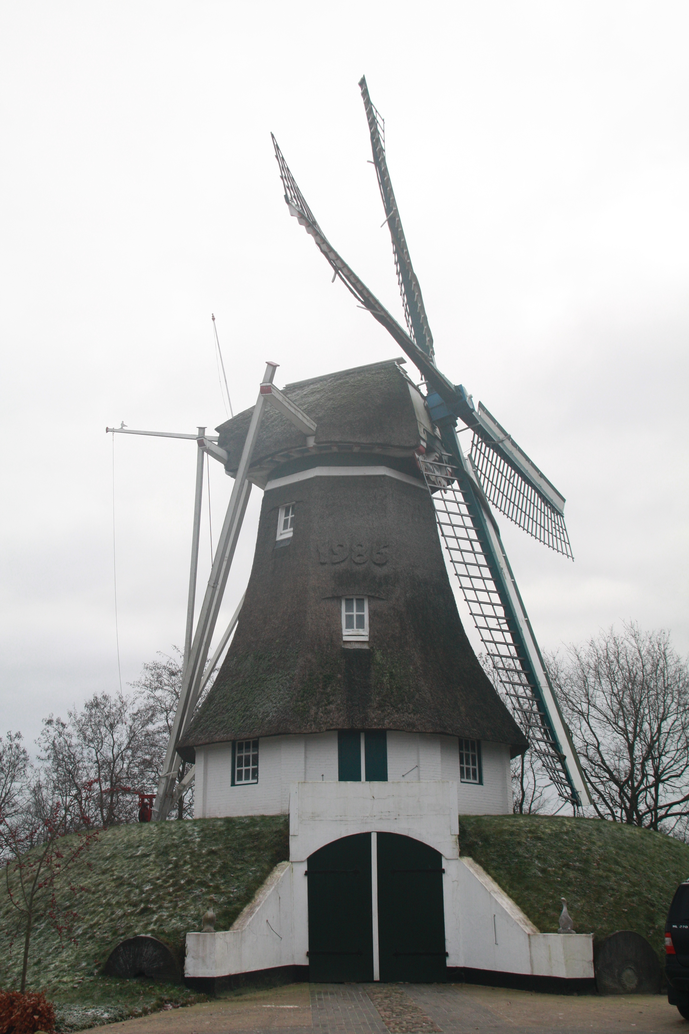 De Hondsrug